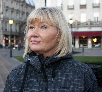 Lillian Hansen